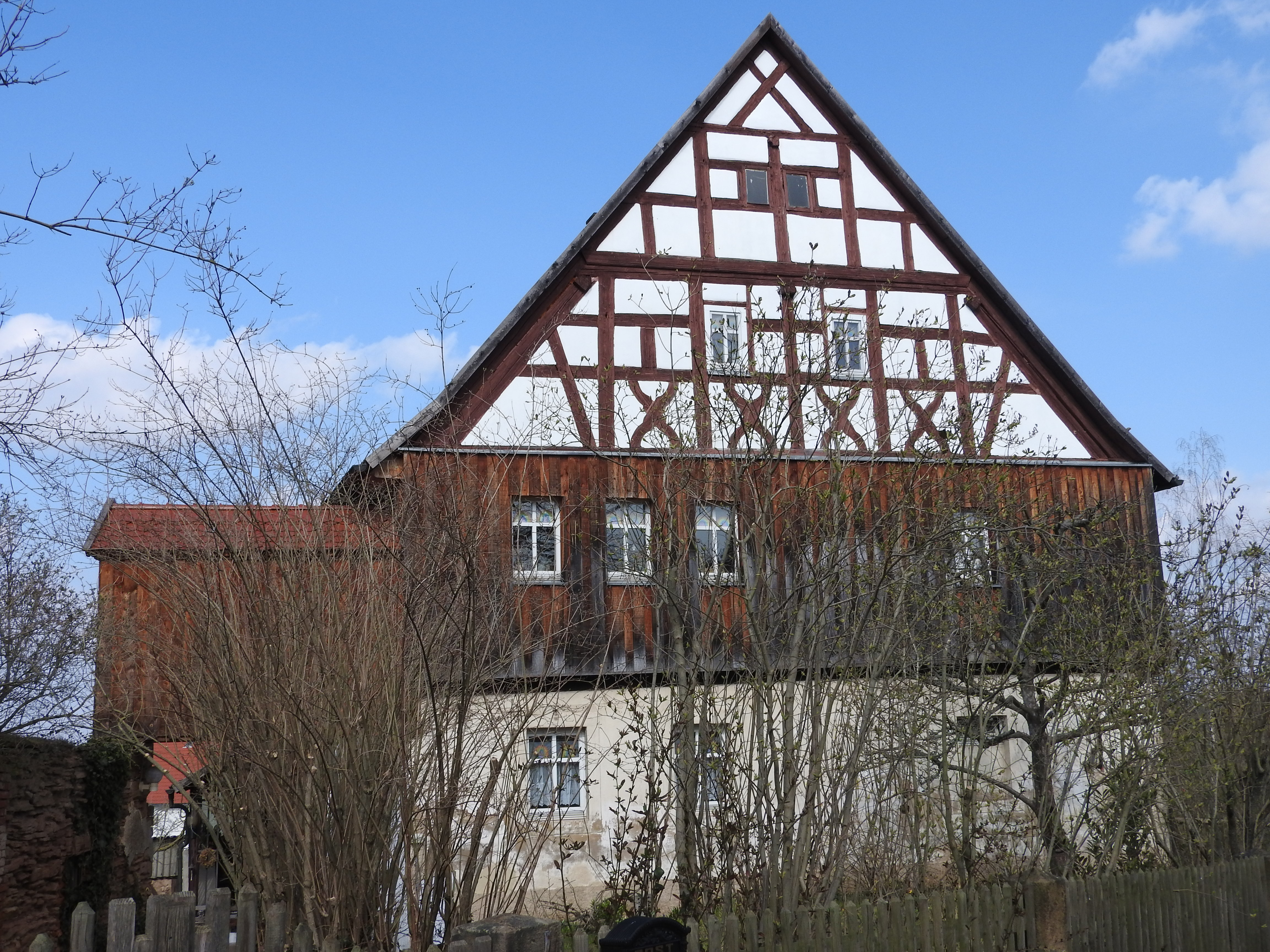 Fachwerkhaus in Niebra in Thüringen